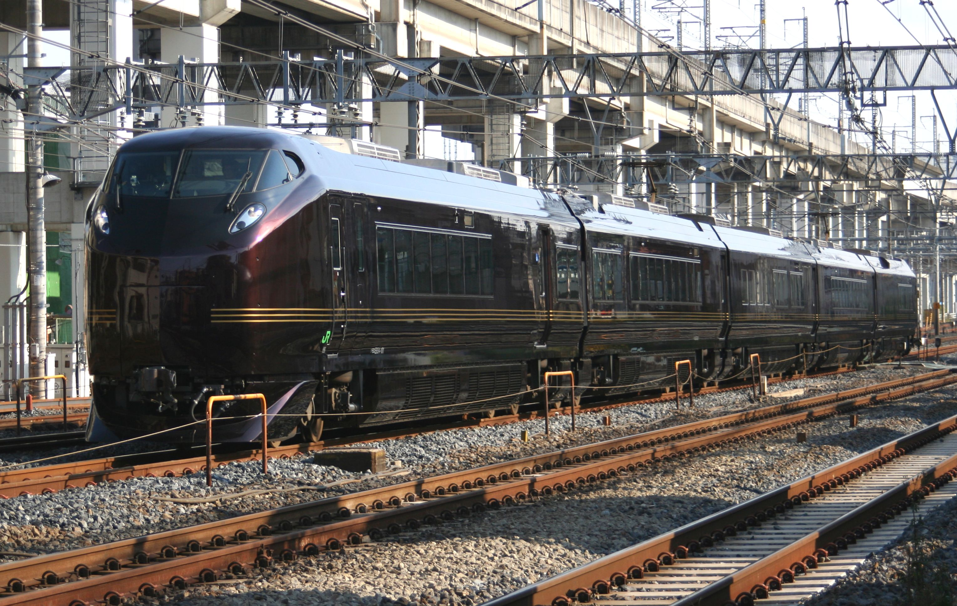 JR東日本E655系電車